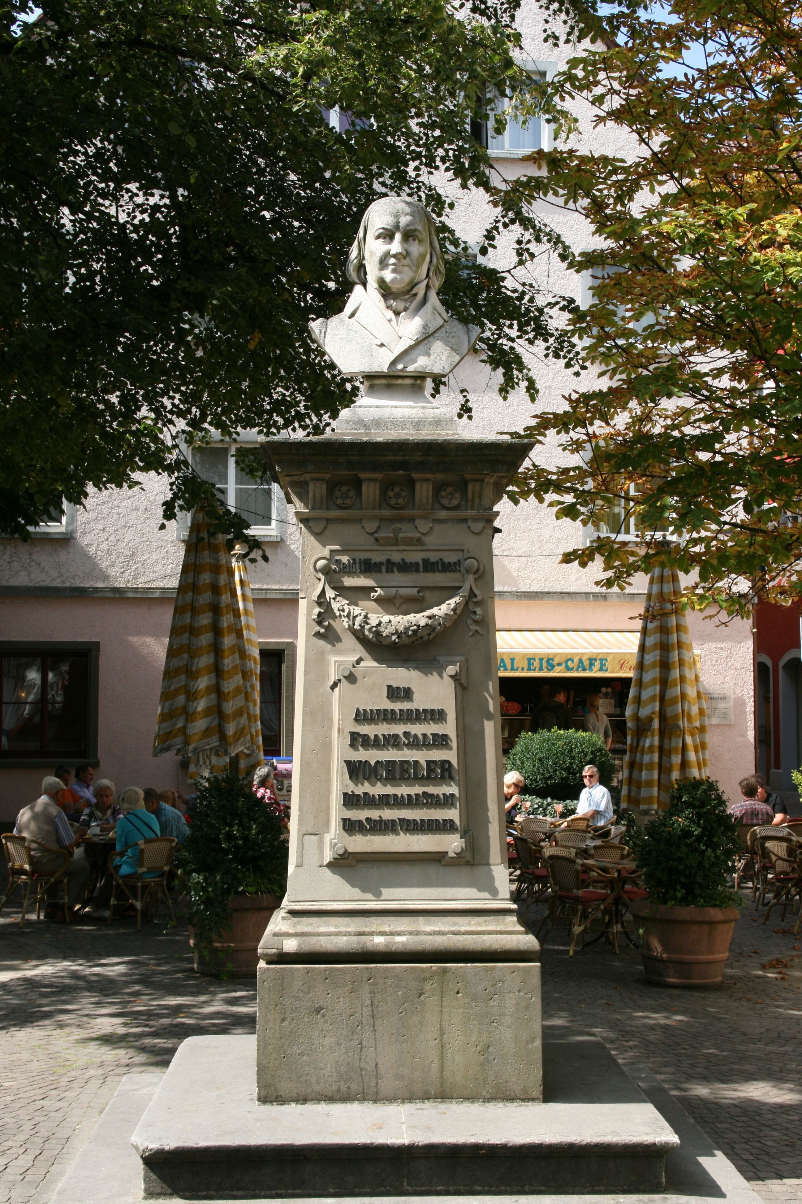 Franz-Sales-Wocheler-Denkmal, Pfarrhofstraße in Überlingen